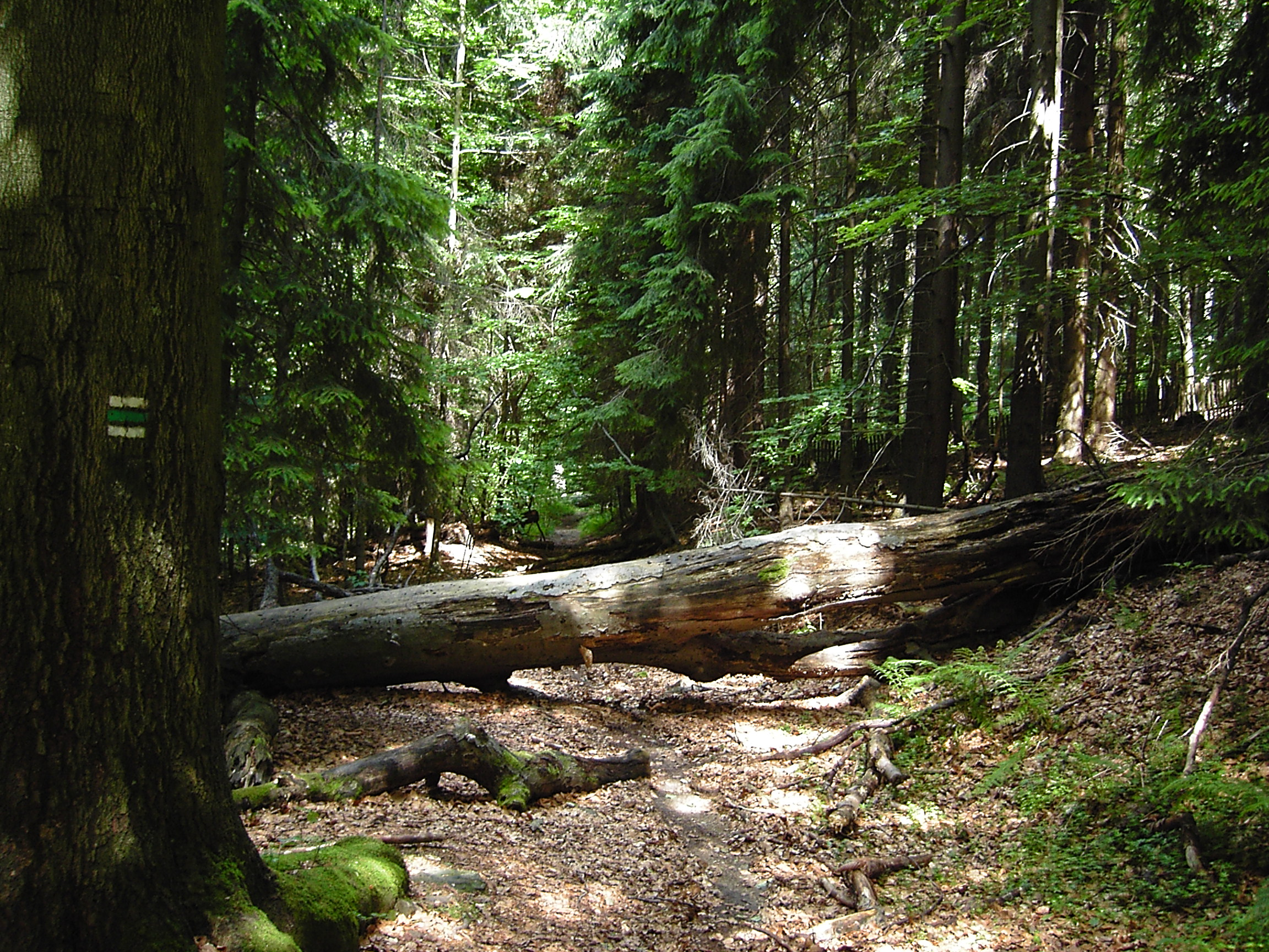 Prales má přednost i před turisty